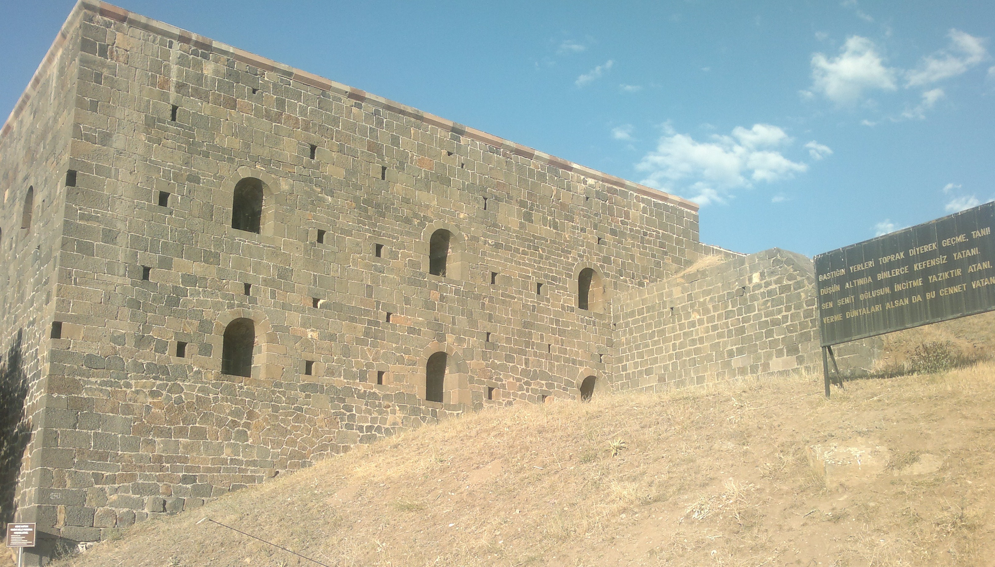 Aziziye Tabyası